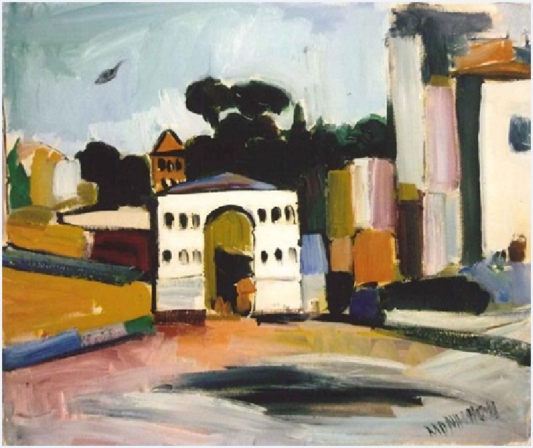 Paesaggio - 1955 - Collezione Privata Personale